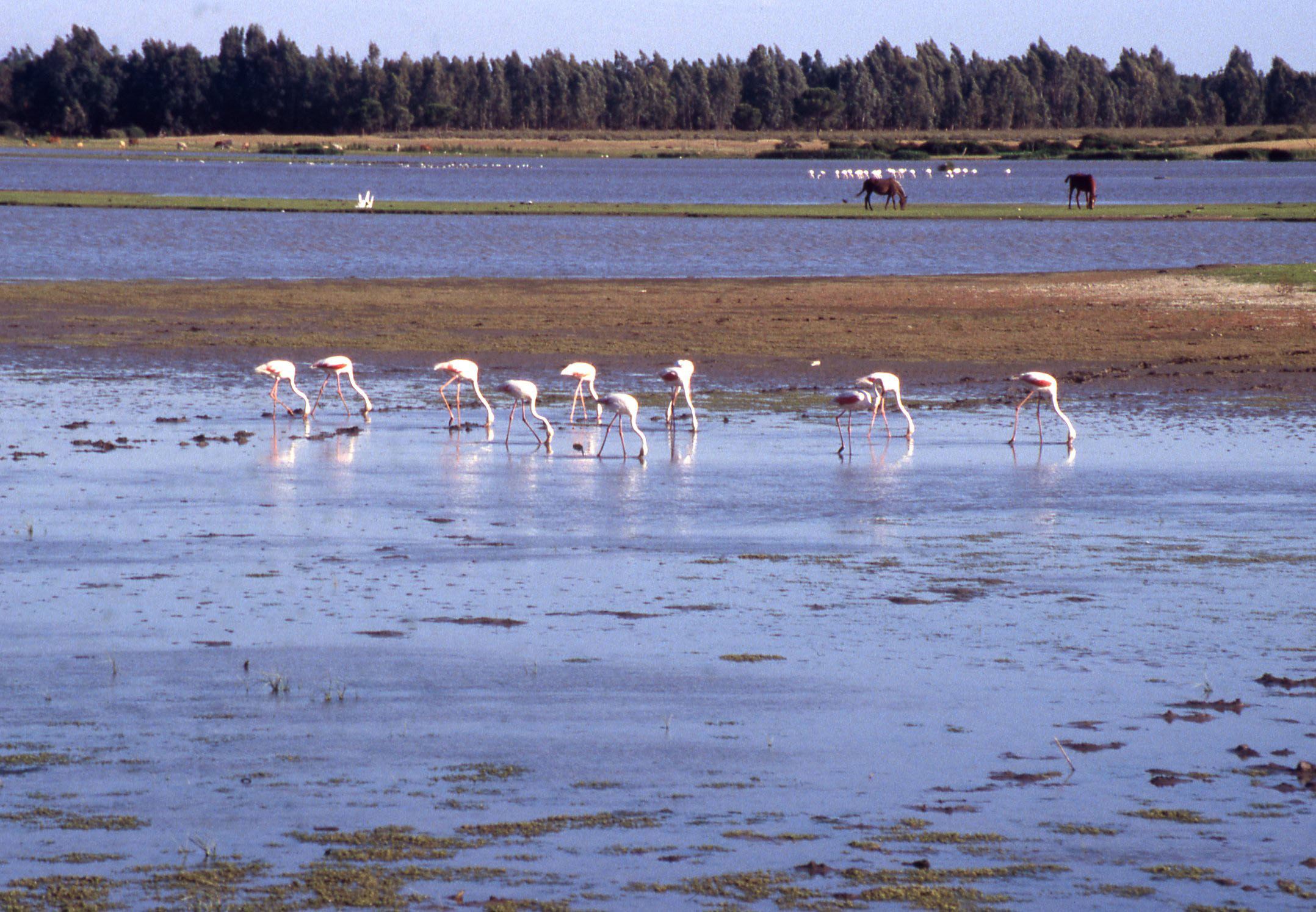 Flamingo's en paarden in Andalusia